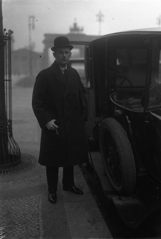 Die Reichstagseröffnung am 5. Januar 1925. Die erste Tagung nach der Auflösung im neuen Jahr. Graf Kanitz, Ernährungsminister, begibt sich zur Sitzung.